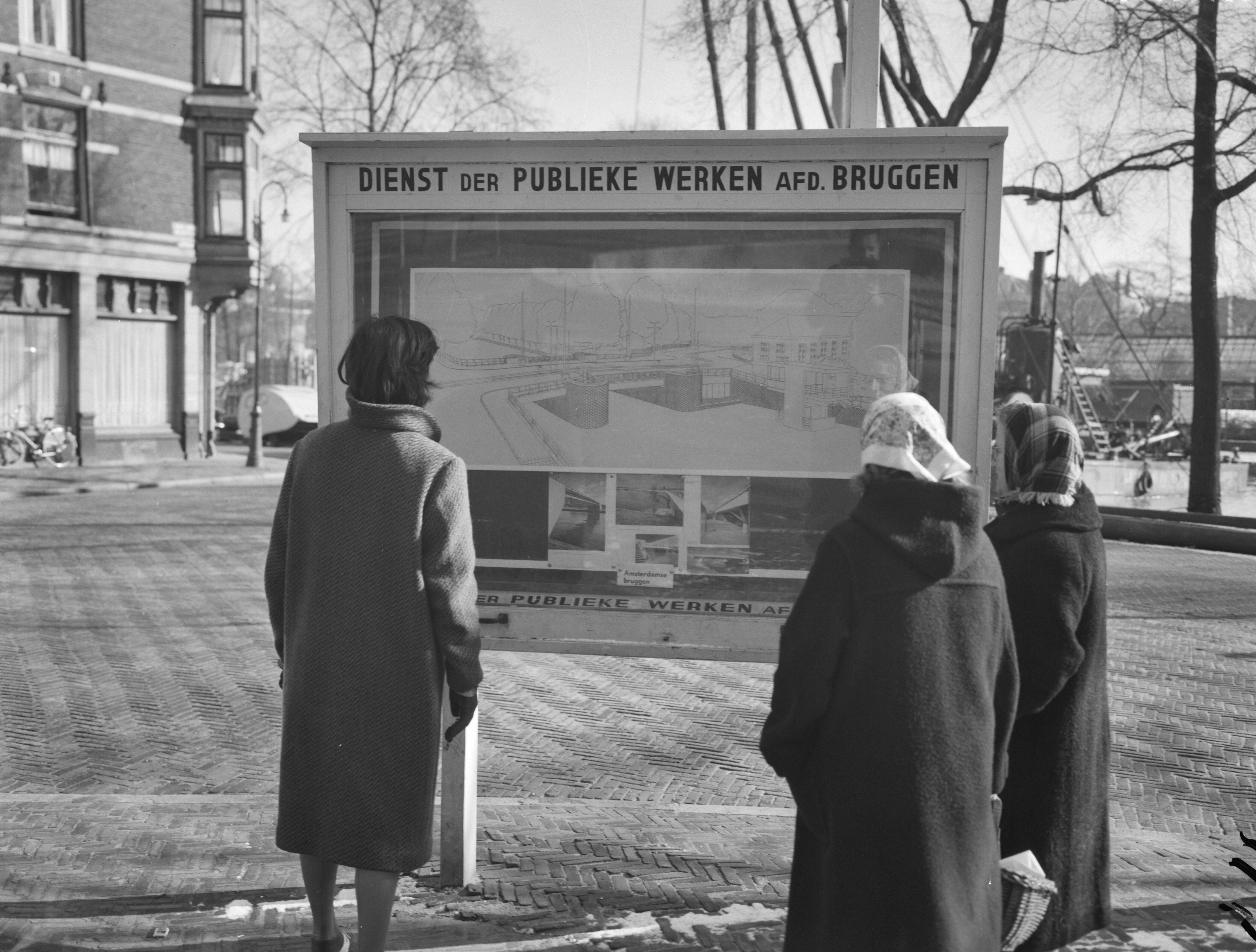 Collectie / Archief : Fotocollectie Anefo Reportage / Serie : [ onbekend ] Beschrijving : Amsterdam bouwt en sloopt in de binnenstad, bord van de nieuwe brug op het J. D. Meyerplein Datum : 17 februari 1960 Locatie : Amsterdam, Noord-Holland Trefwoorden : BRUG, binnensteden, borden, bouw Persoonsnaam : J. D. Meyerplein Fotograaf : Rossem, Wim van / Anefo Auteursrechthebbende : Nationaal Archief Materiaalsoort : Negatief (zwart/wit) Nummer archiefinventaris : bekijk toegang 2.24.01.04 Bestanddeelnummer : 911-0384